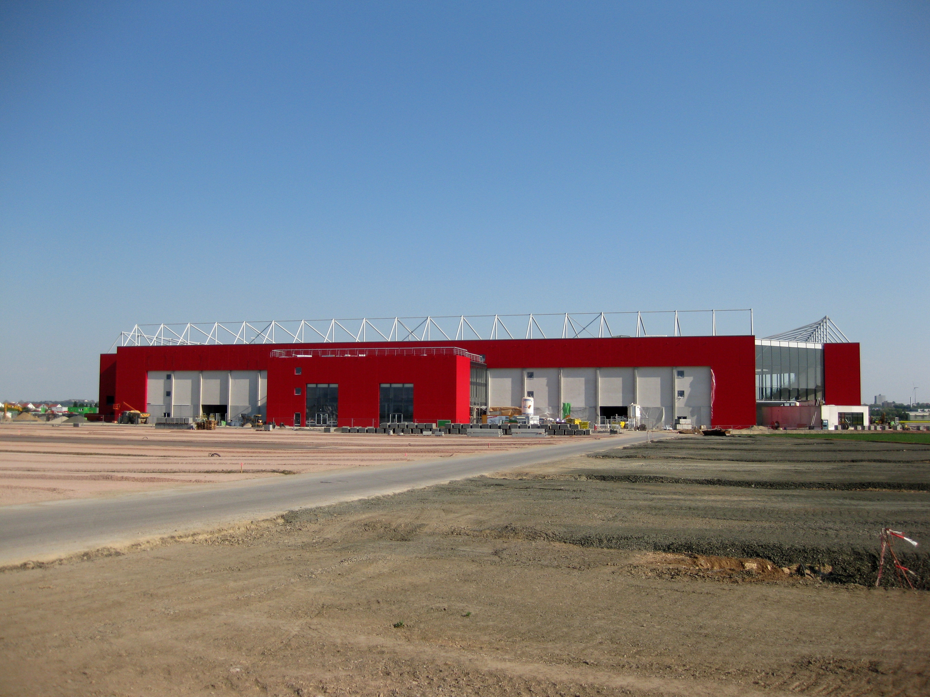 Aufnahme von der Coface-Arena in Mainz-Bretzenheim (Eugen-Salomon-Straße) im Bau am 25. April 2011